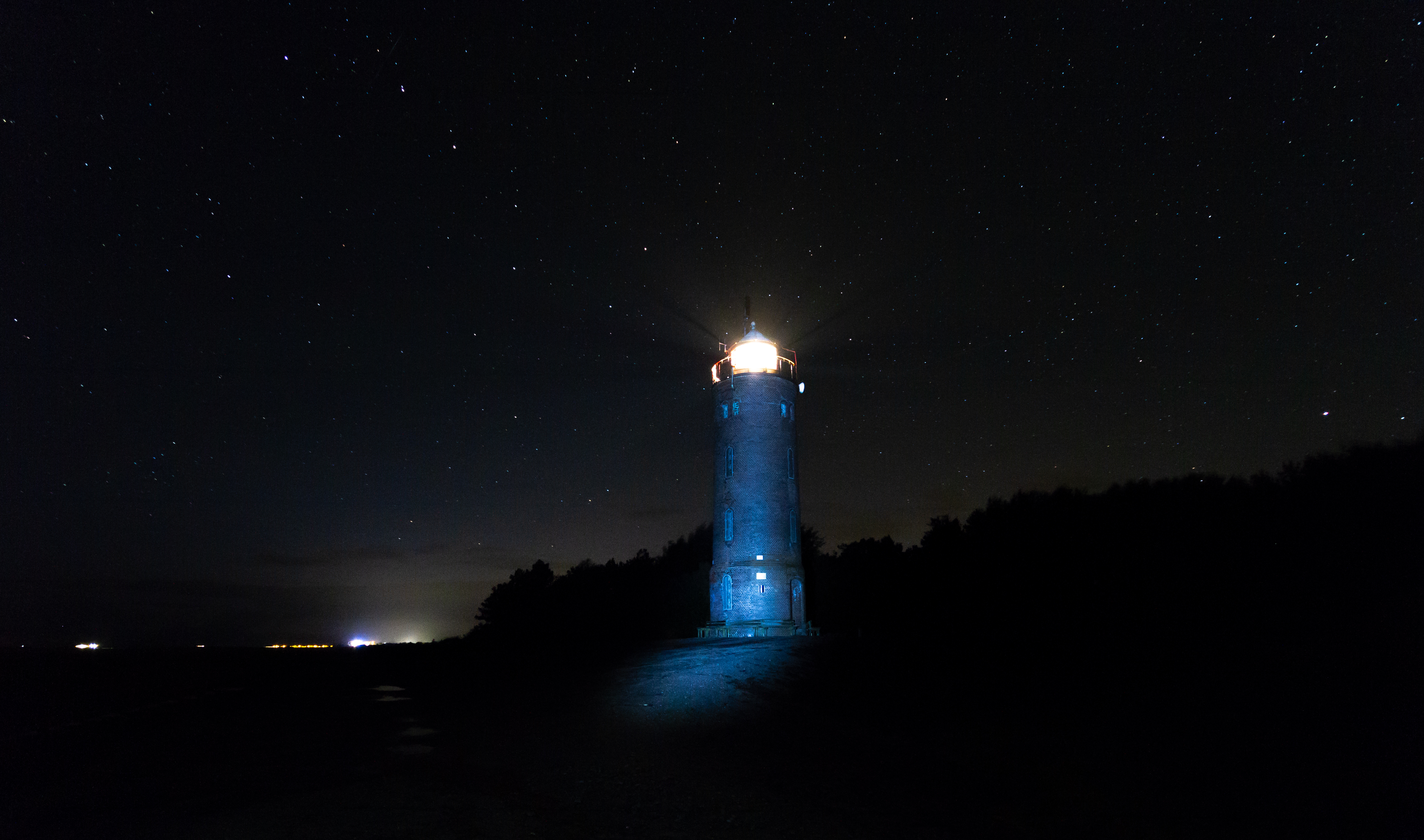 Sterne über dem Leuchtturm Böhl im FFH Schutzgebiet Dünen St. Peter.